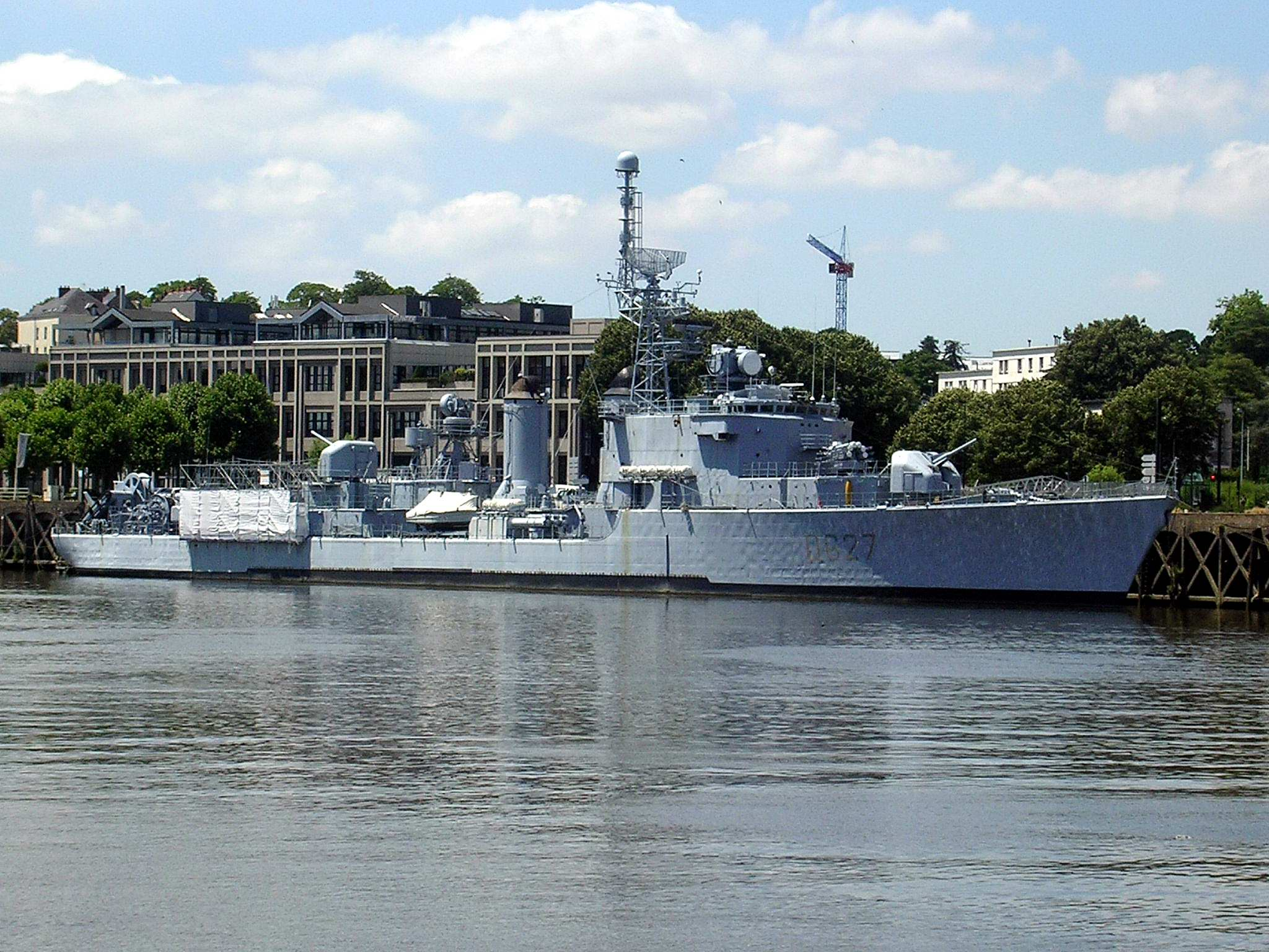 Maillé-Brézé, amarré quai de la Fosse, à Nantes